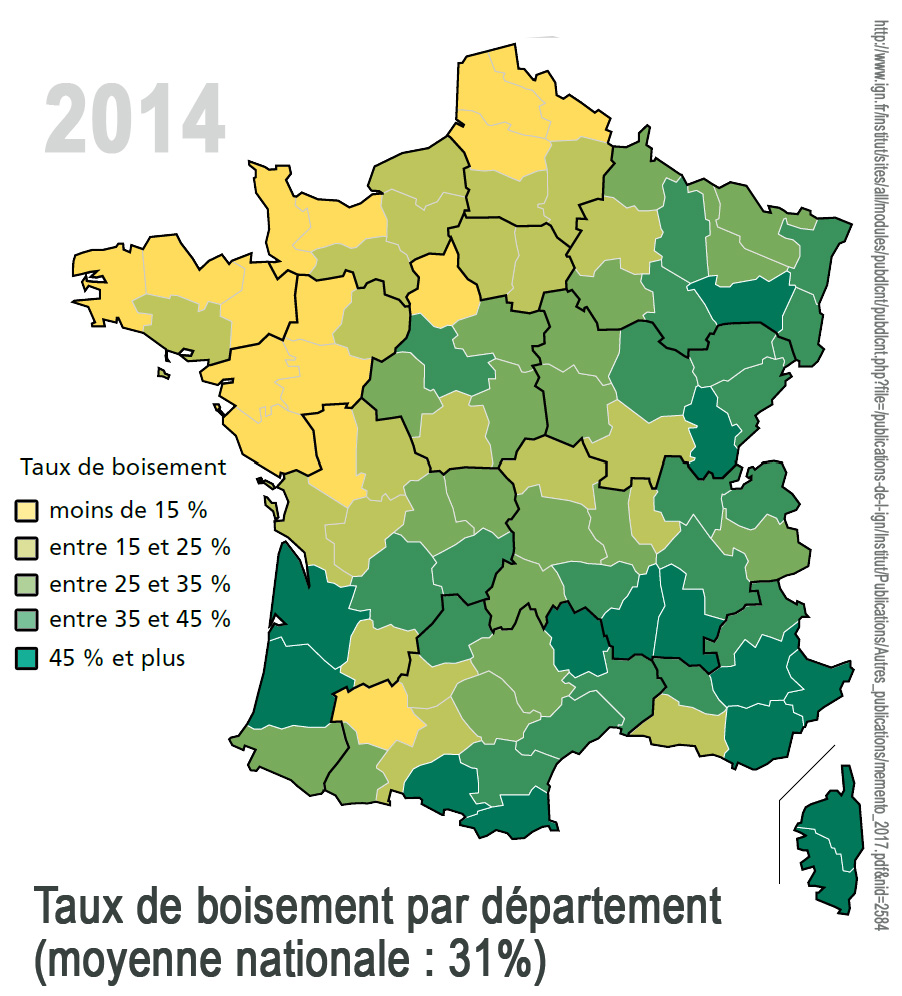 Forêt taux boisement par département métropolitain en 2014 (estimation) d'après données et graphiques 2014 collectées par l'IGN et publiés en 2017 (IGN (2017) Le mémento ; Inventaire forestier 2017)